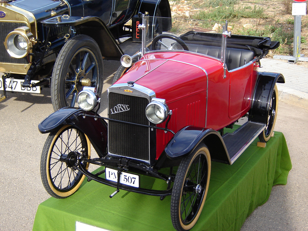 Modell eines LORYC